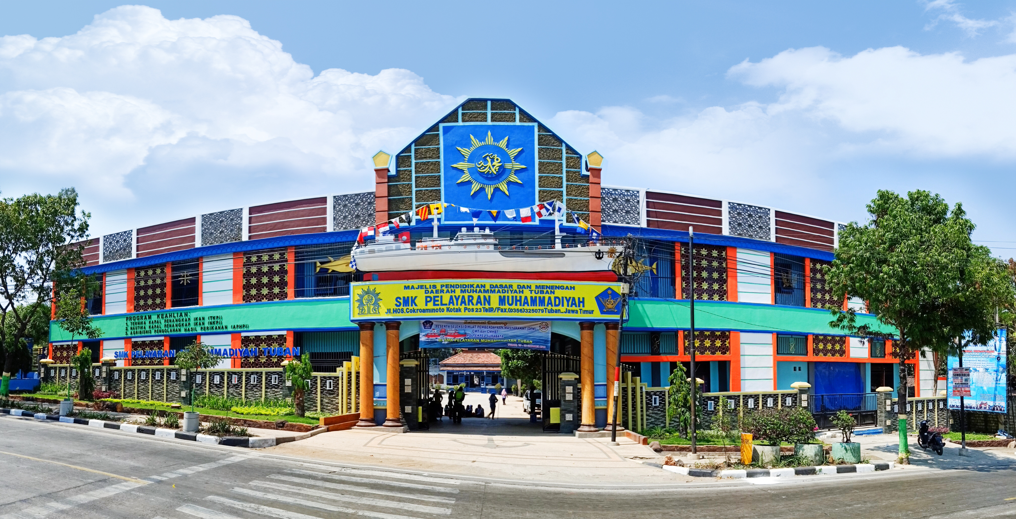 gedung smk pelayaran muhammadiyah tuban